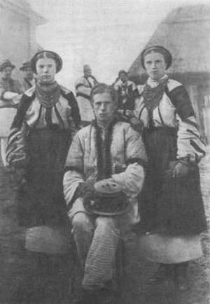 Наддністряни у національному вбранні